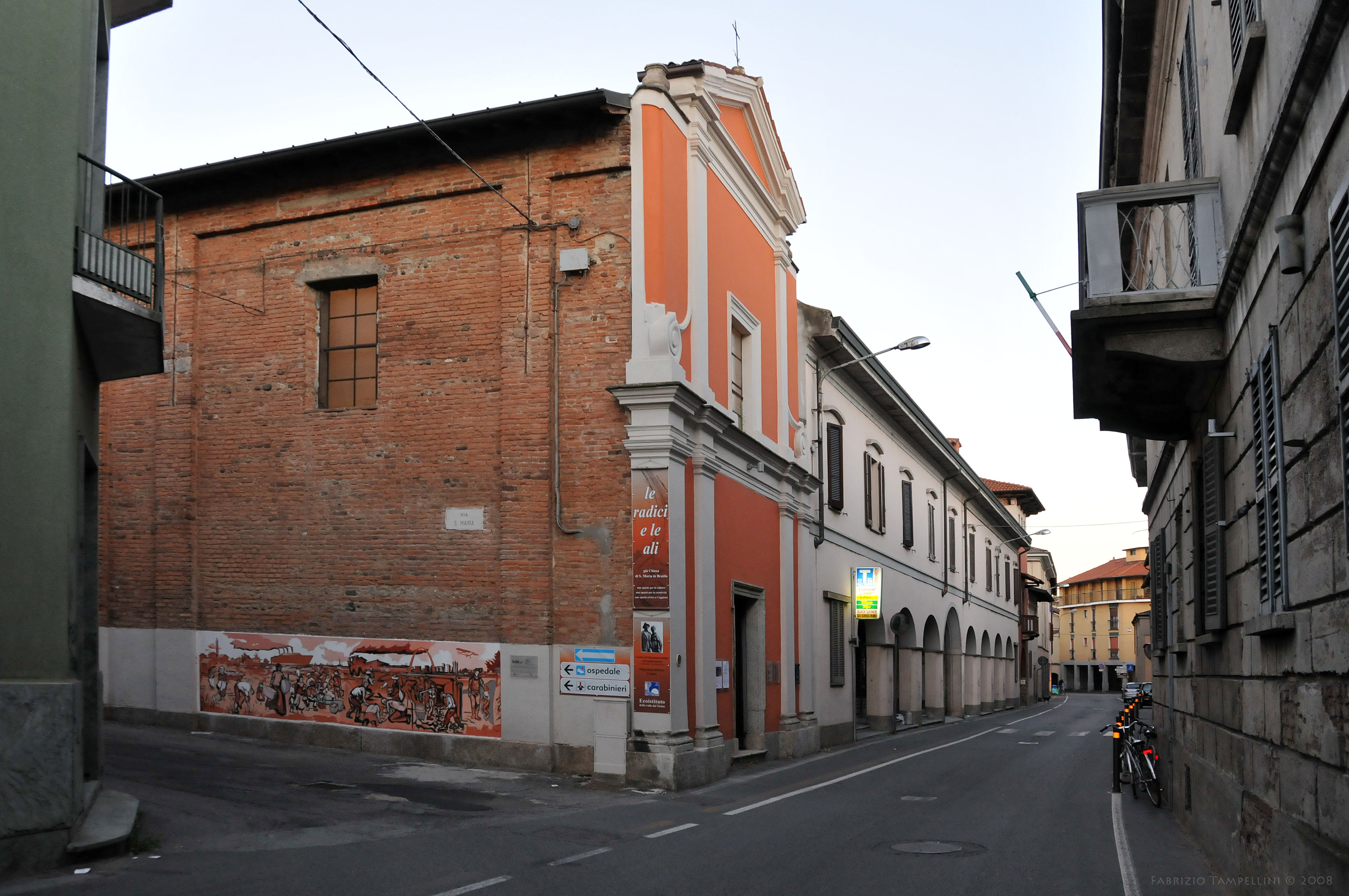 Via S. Rocco (Le Radici e le Ali )